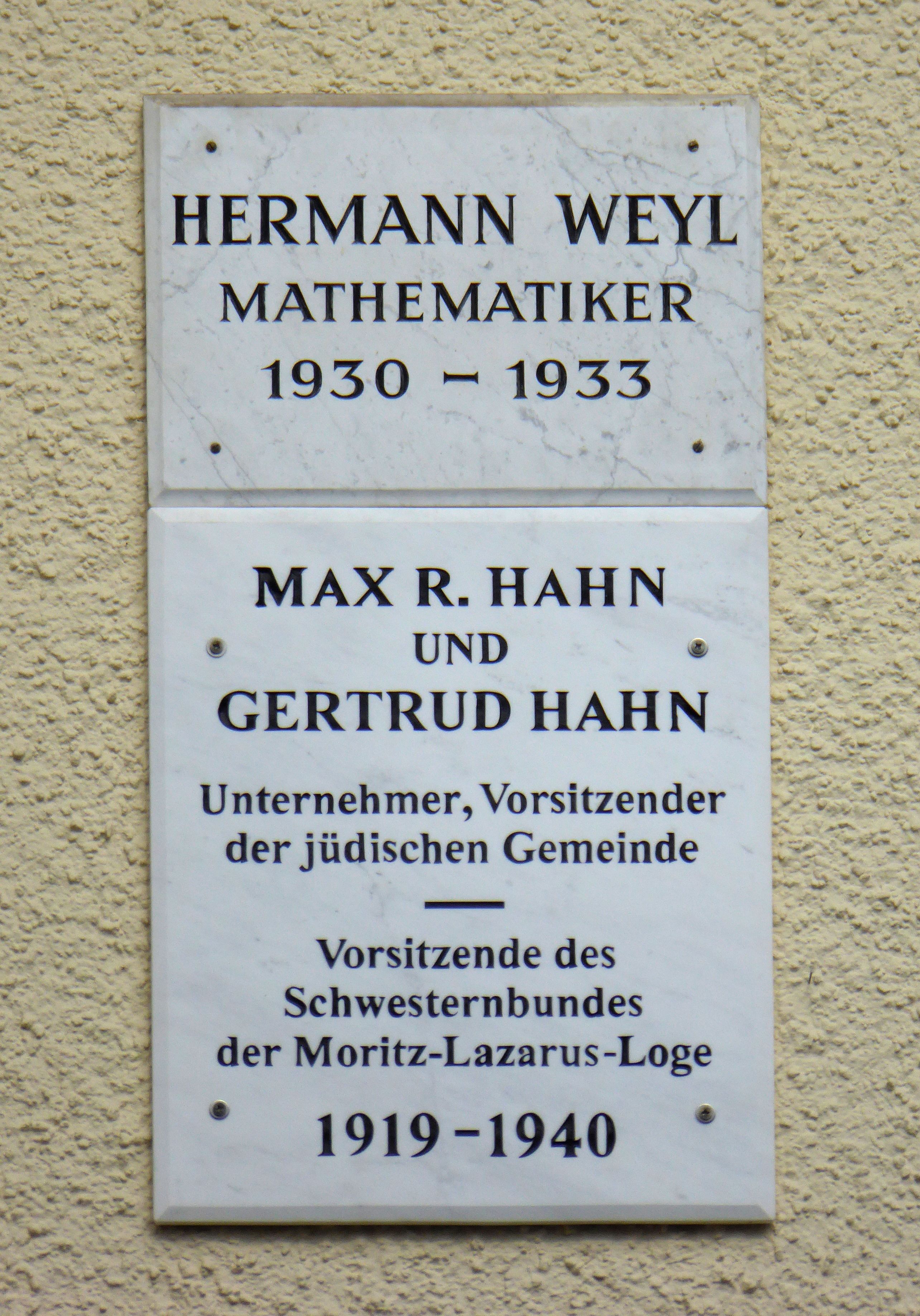 Göttinger Gedenktafeln für Hermann Weyl und Max und Gertrud Hahn an der ehemaligen Hahnschen Villa Merkelstraße 3 in Göttingen, Niedersachsen